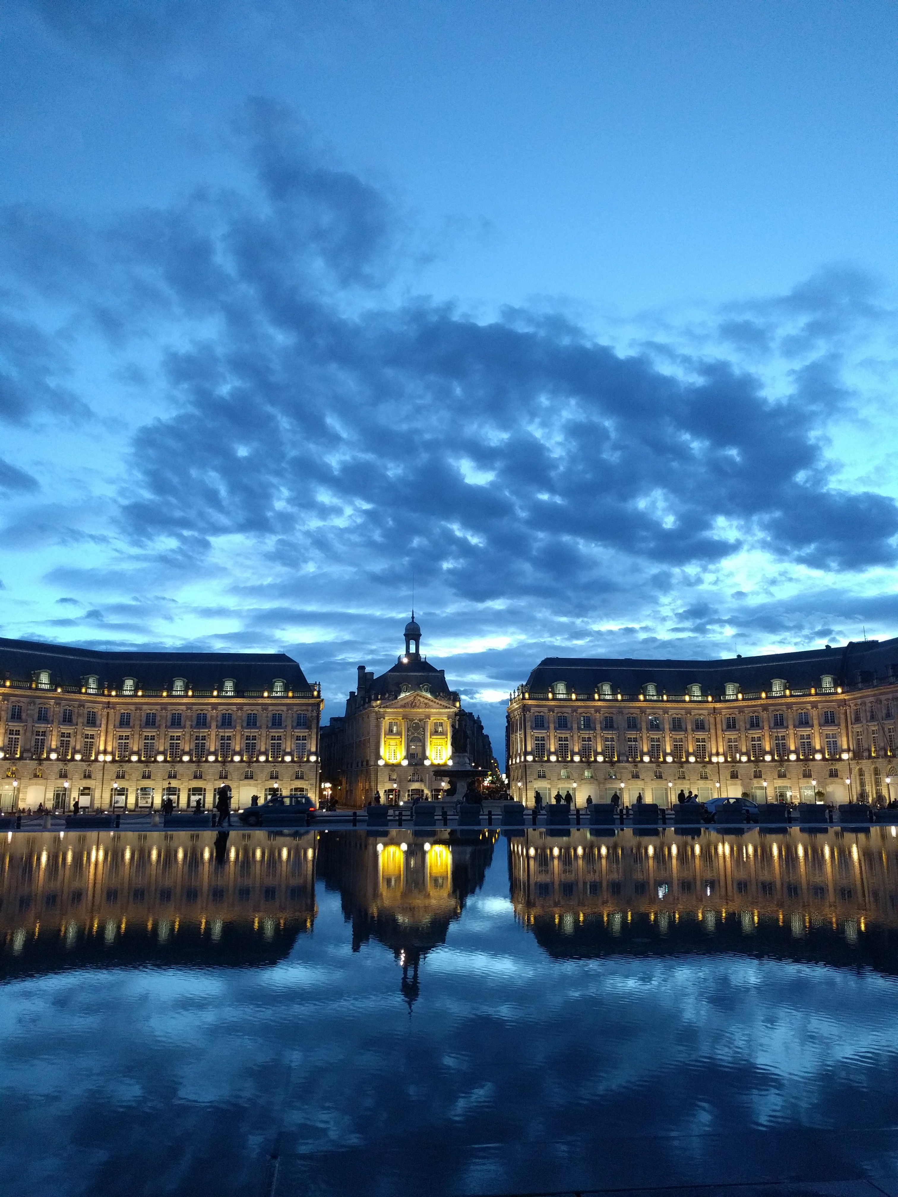 Vista de la Place de la Bourse reflexada al Miroir d'eau, la piscina reflectant más gran del món.